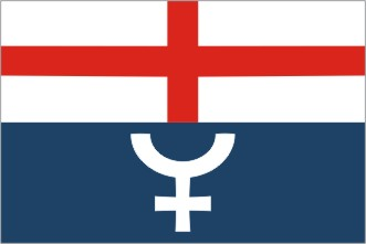 Vápno (okres Pardubice)